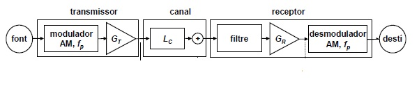 Ejemplo de Cadena de Medida